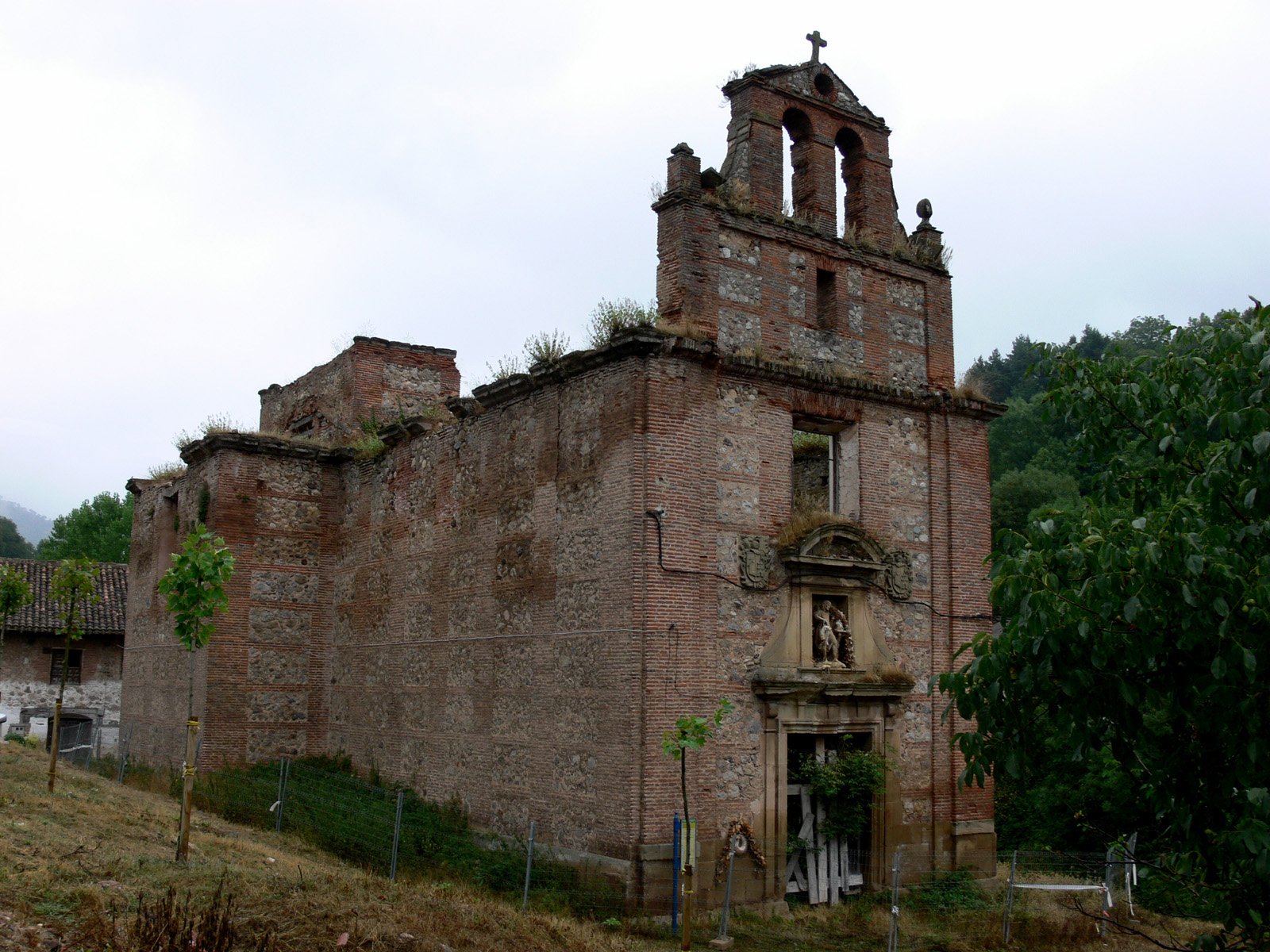 Ruinas de la iglesia de San Juan en Pedroso (La Rioja - España)